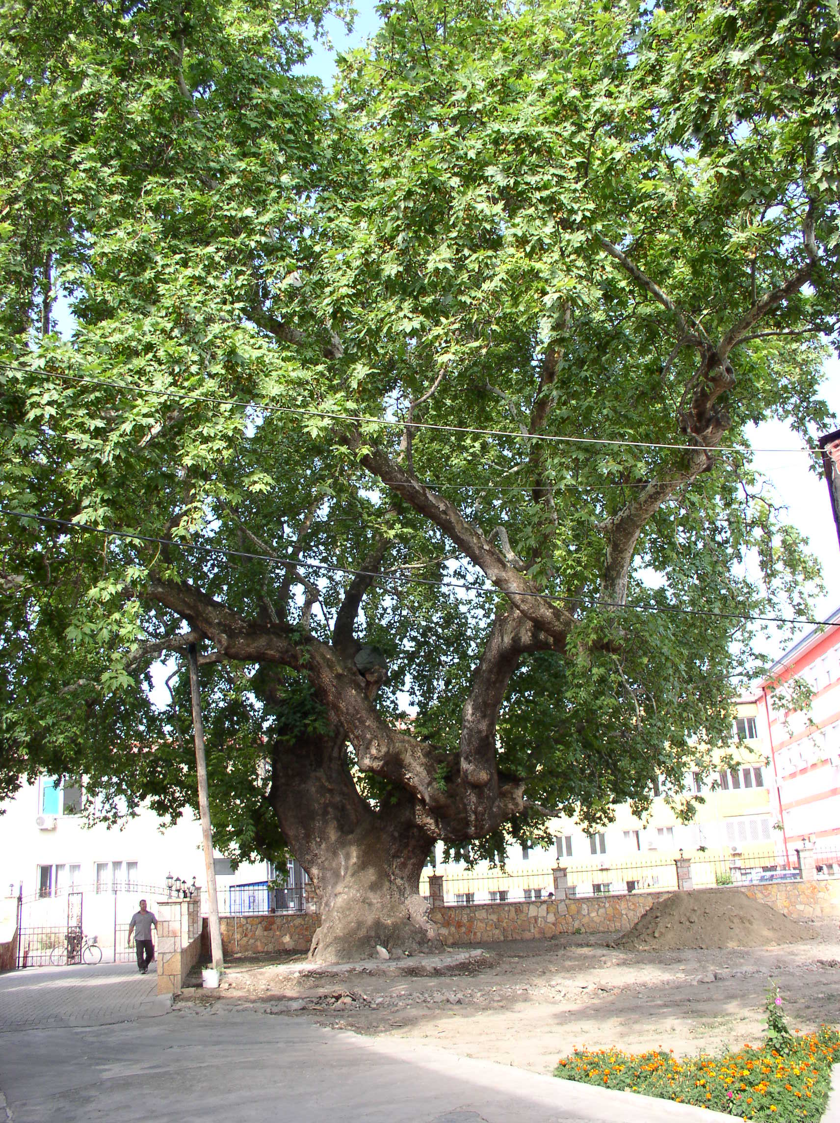 Платан испред Гази Иса-бегове џамије